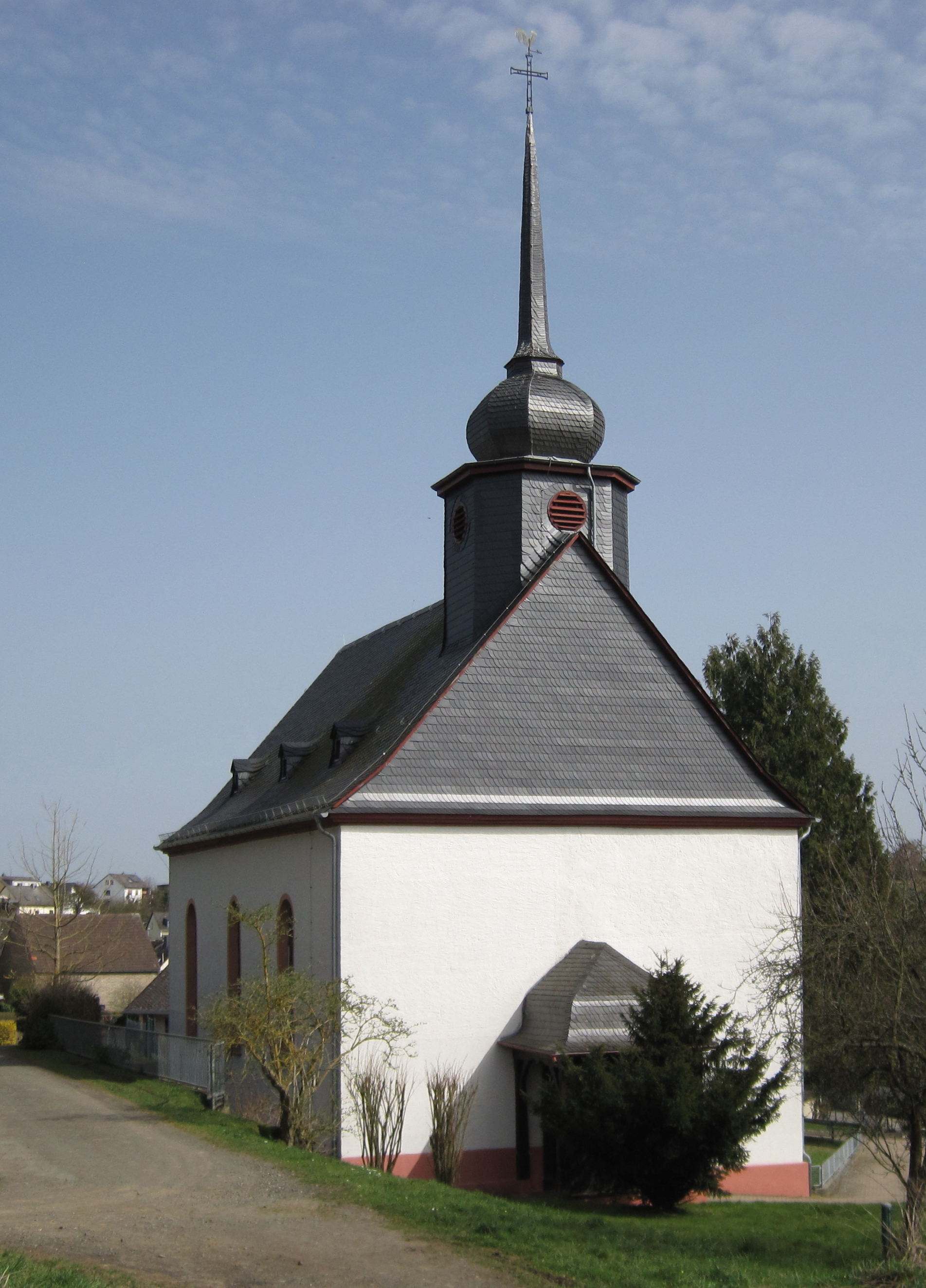 Katholische Filialkirche St. Goar. Dreiachsiger Saalbau, erbaut 1803 von Ludwig Rausch, Dachreiter von 1889. Prath, Rhein-Lahn-Kreis, Rheinland-Pfalz.